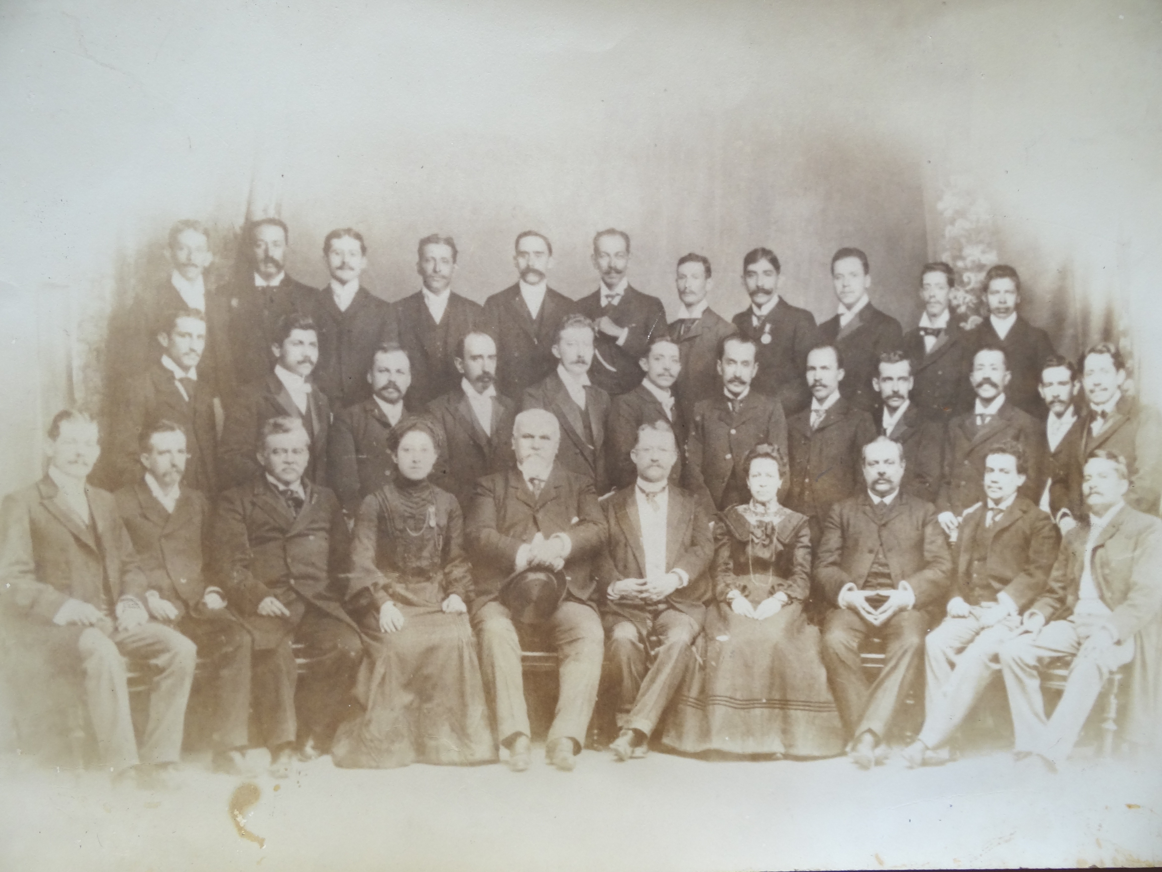 Generacion de Maestros de la Universidad Autónoma de Xalapa, Veracruz, México